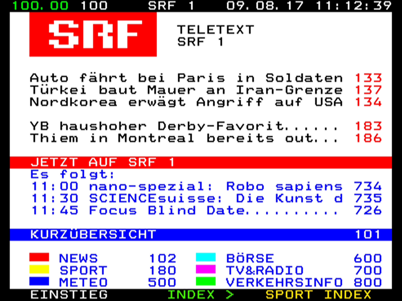 Startseite des SRF-Teletextes